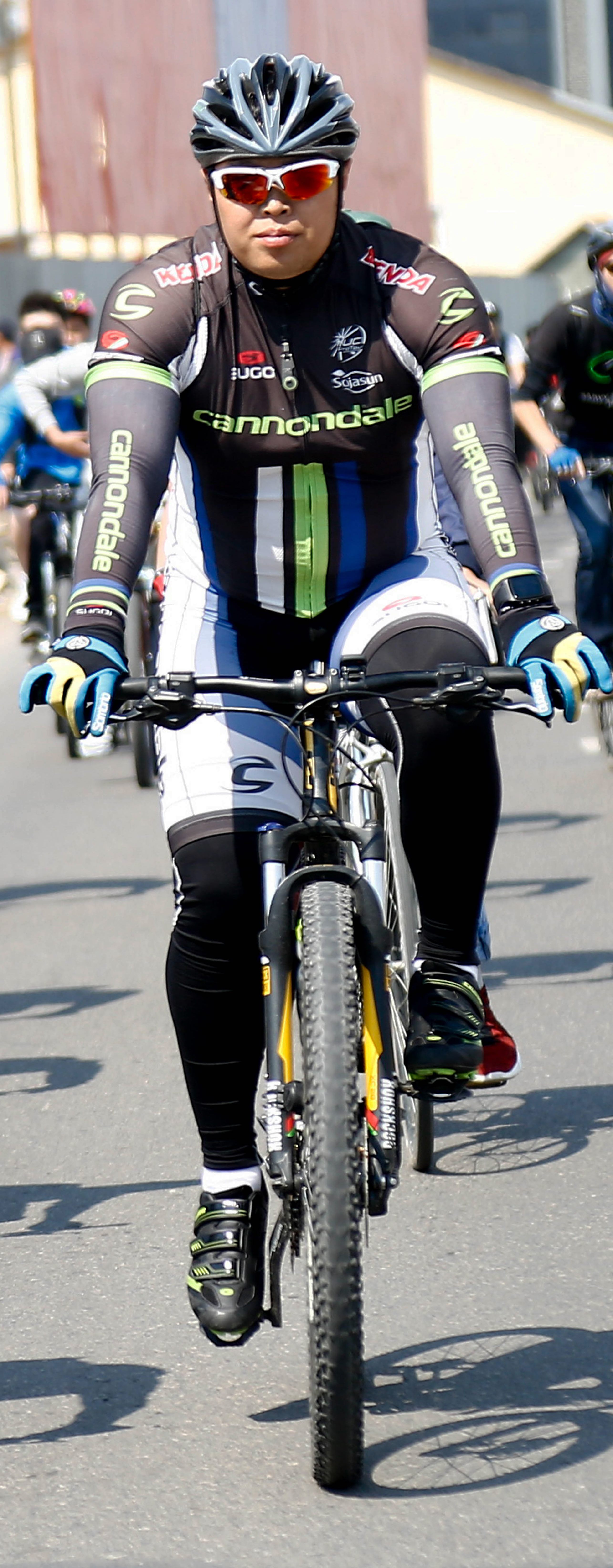 Монгол: Залуу дугуйчин клубийн тэргүүн